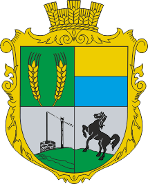 Герб с. Семенівка (Білгород-Дністровський район)